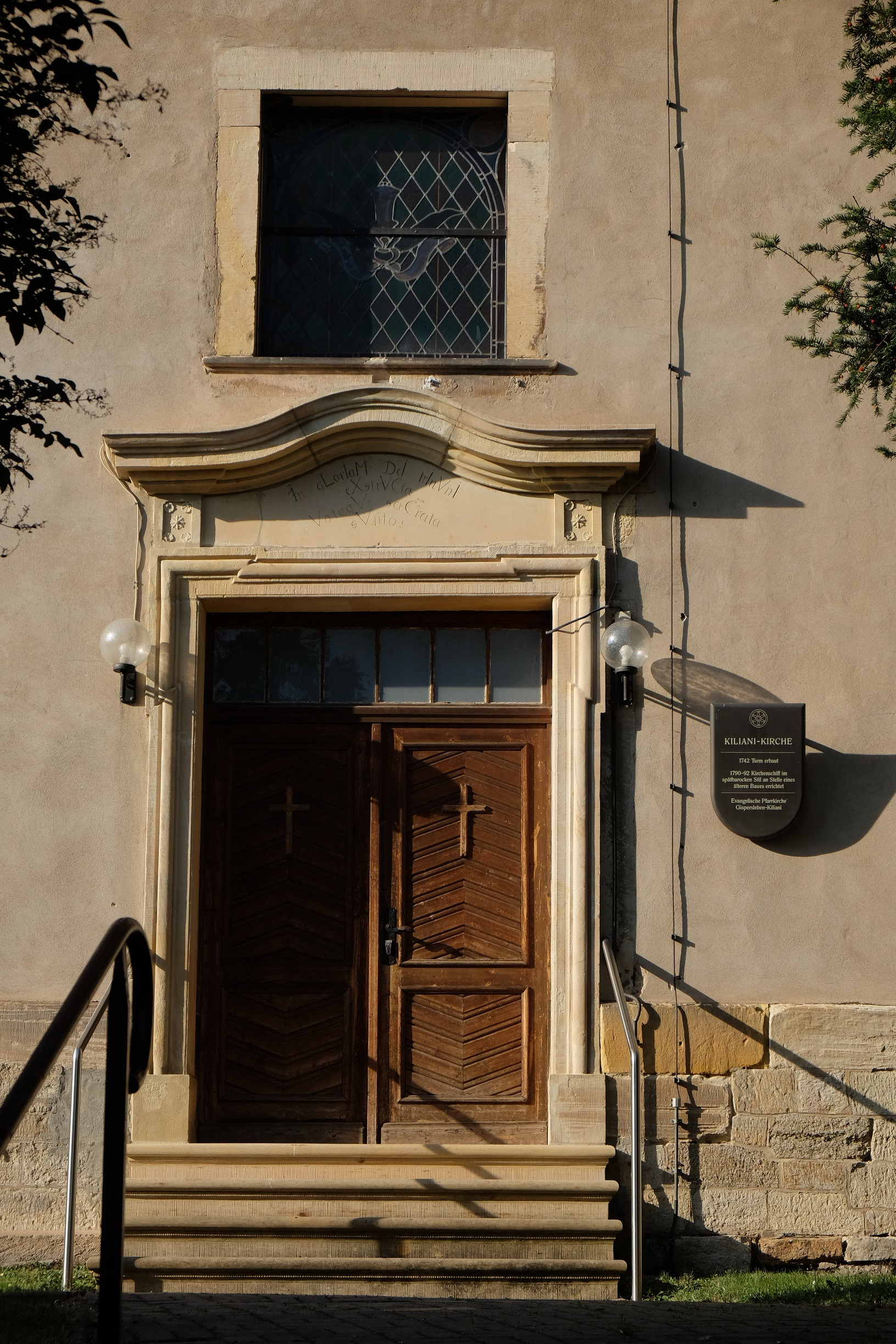 Erfurt-Gispersleben, Kirche, Zittauer Str. 34